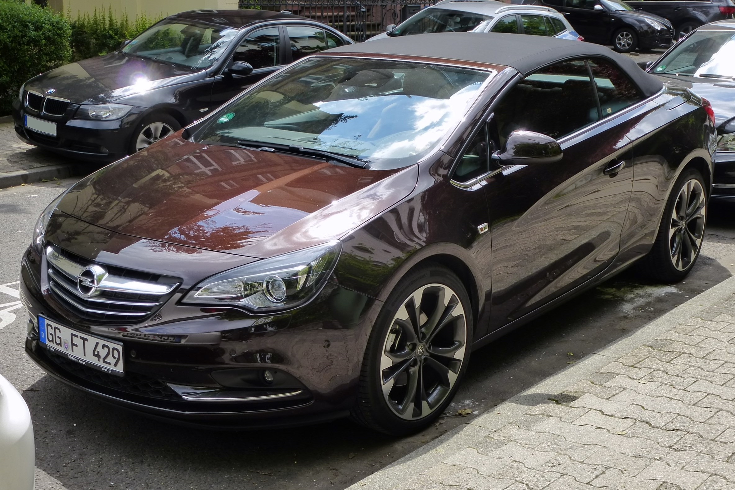 Opel Cascada